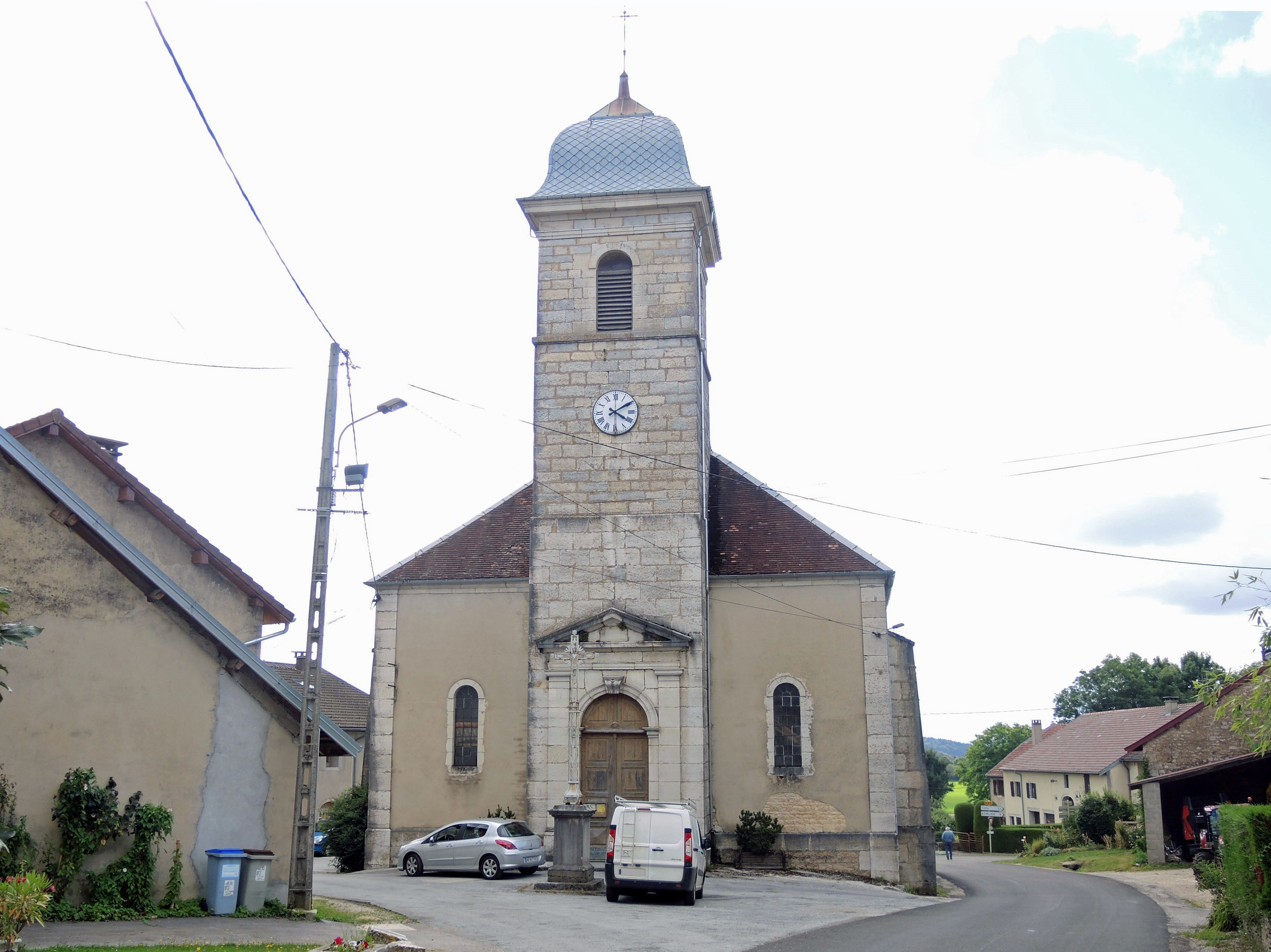 Façade de l'église saint Maurice